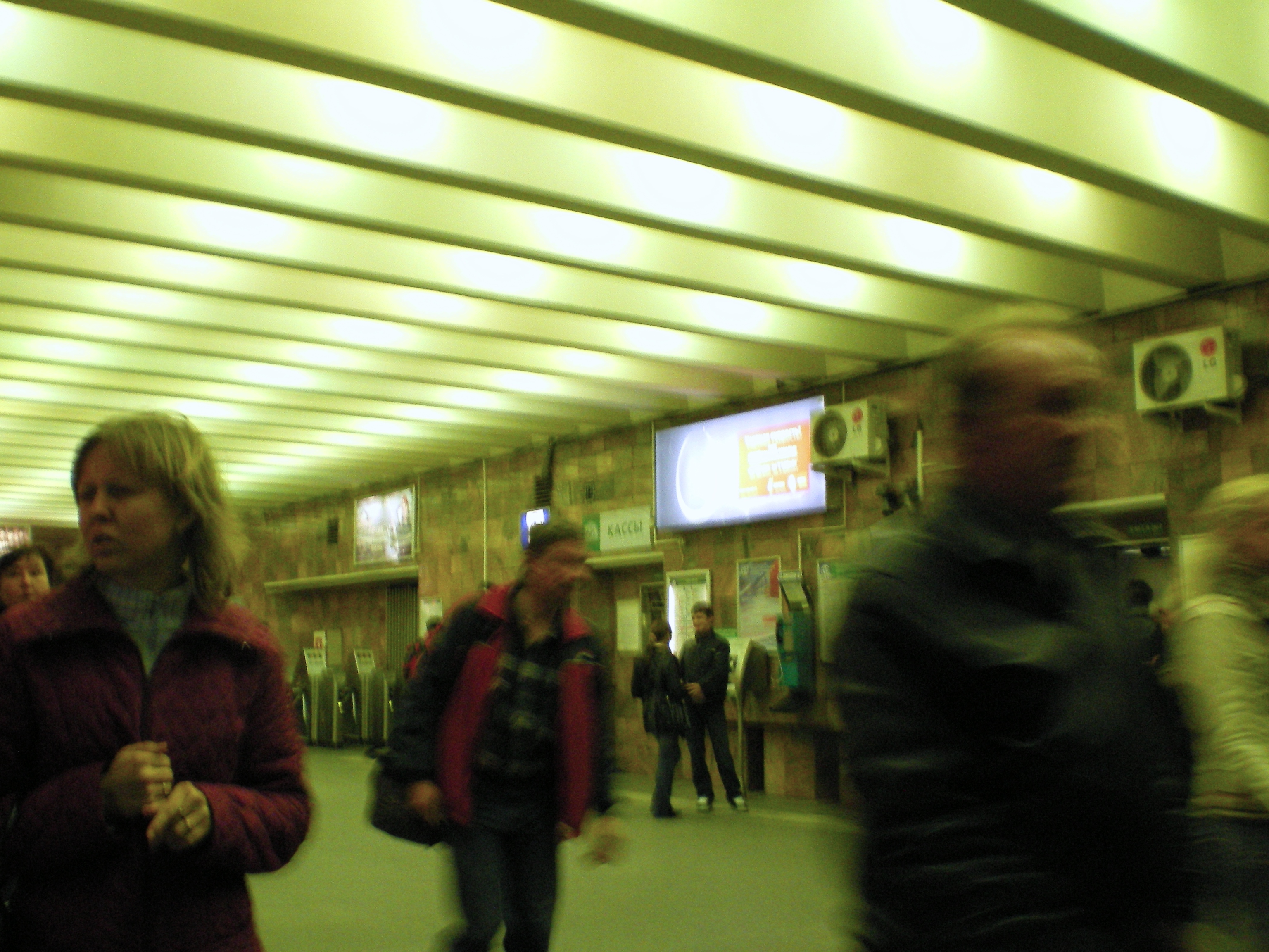 Станция метро «Новочеркасская». Вестибюль.